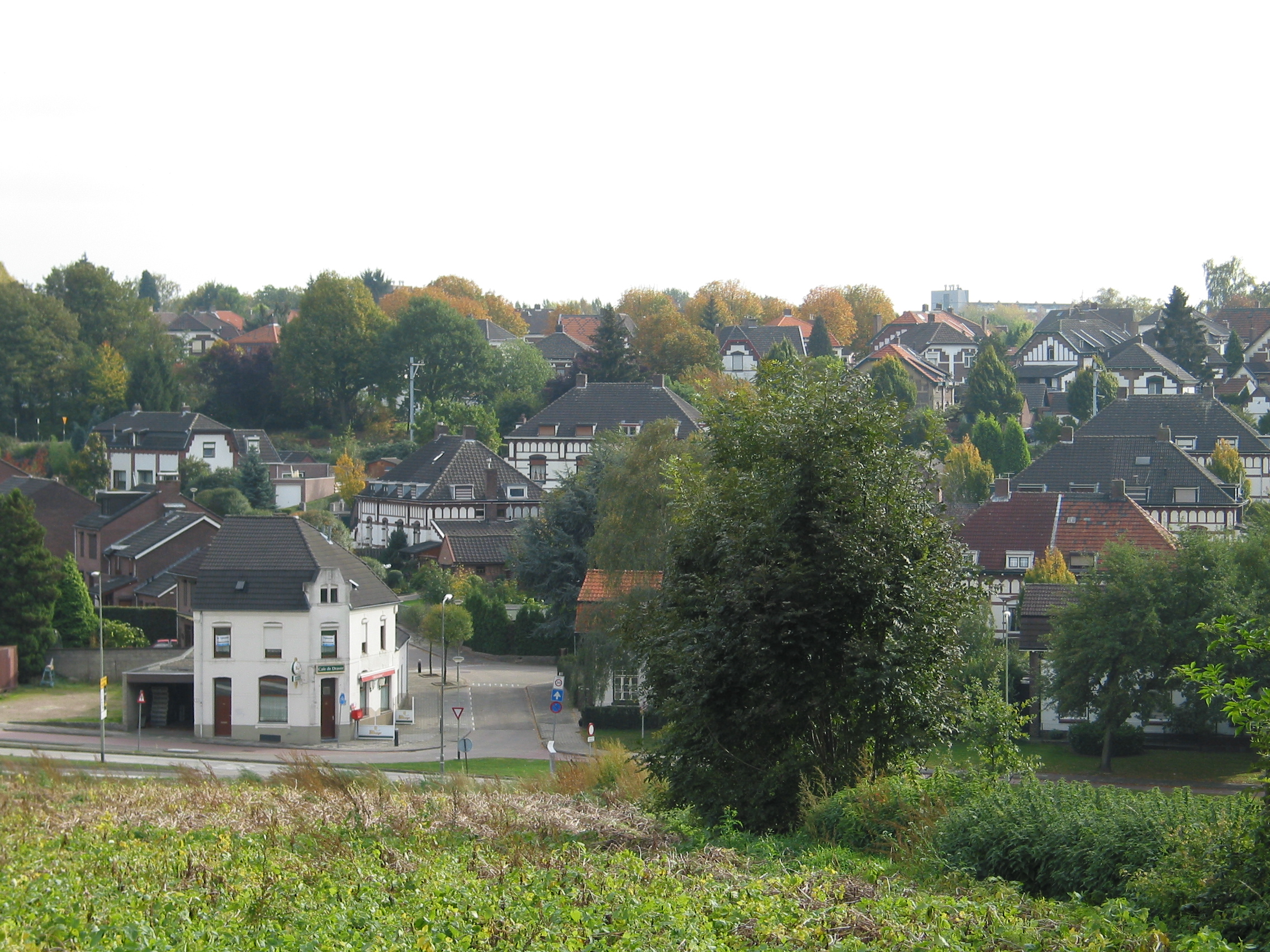 Mijnkolonie Leenhof in Schaesberg